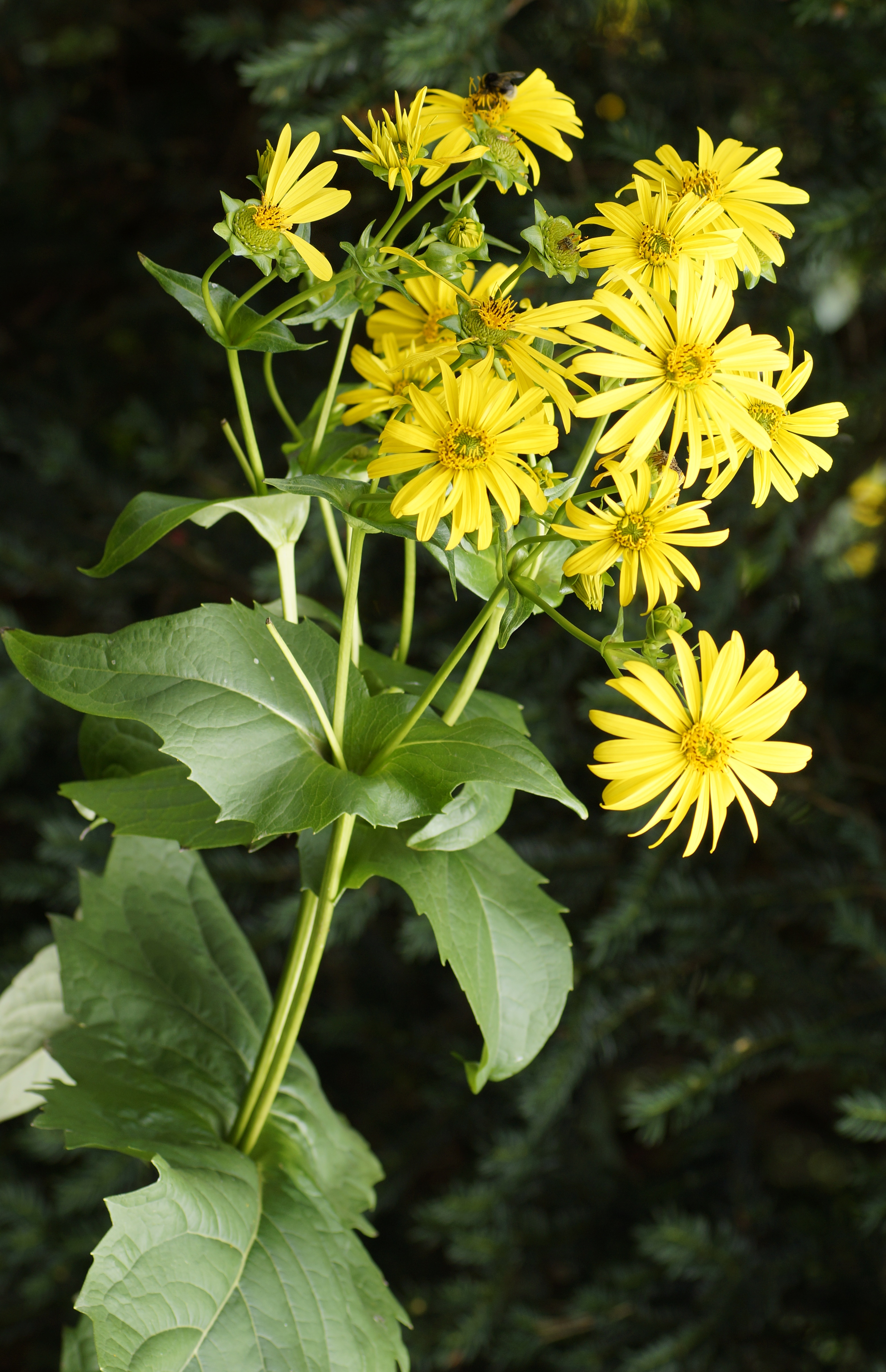 Becherpflanze, Durchwachsene Silphie, Asteraceae, Deutschland, Bayern, Oberfranken, Hof, Botanischer Garten Photo: U.Schmidt, VIII.2012